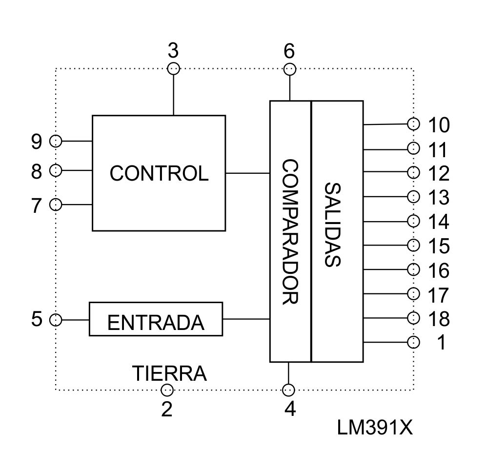 Diagrama en bloques de la familia de circuitos integrados LM39xx para manejar 10 iluminadores en funcion de la tension de entrada.